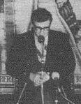 Julio Cesar Turbay toma posesión como presidente de Colombia en 1978 (detalle).